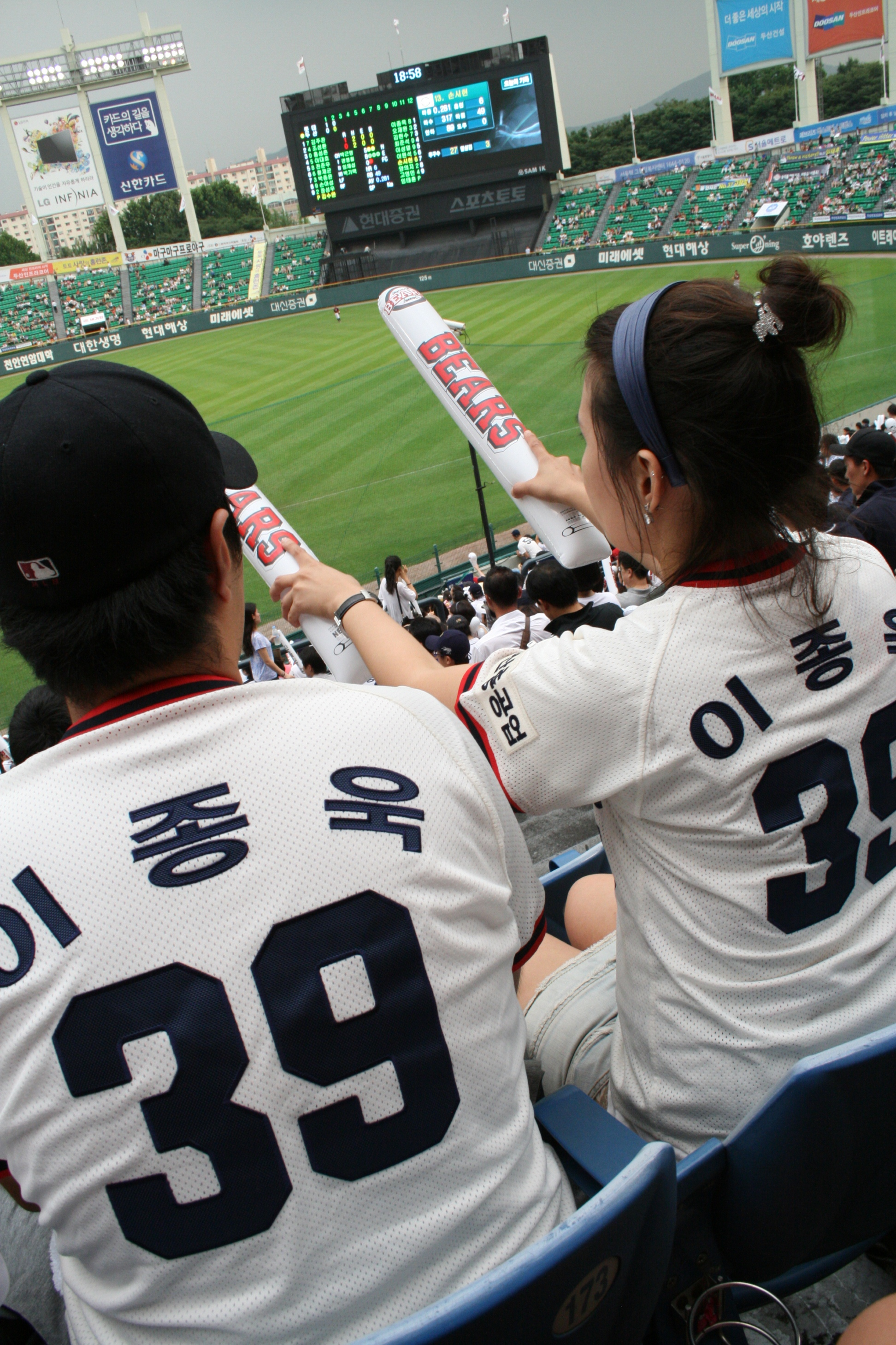 Doosan Bears 39 Fans